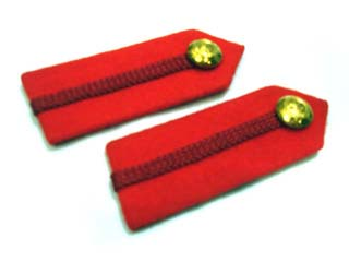 Kernowek: Gorget SD